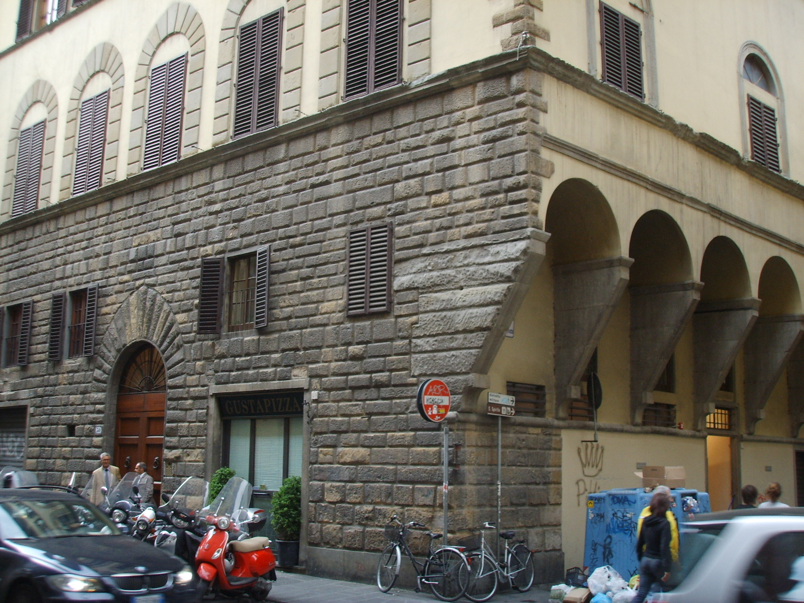 Palazzo biliotti